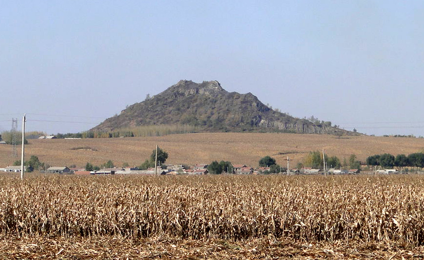 吉林省伊通满族自治县西尖山。